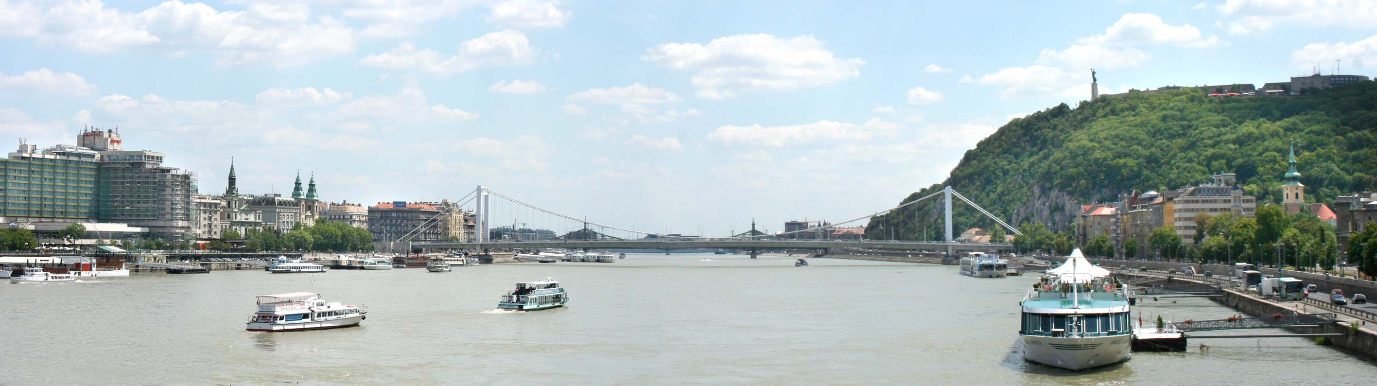 Budapesti panoráma, és az Erzsébet híd, a Lánchídról nézve